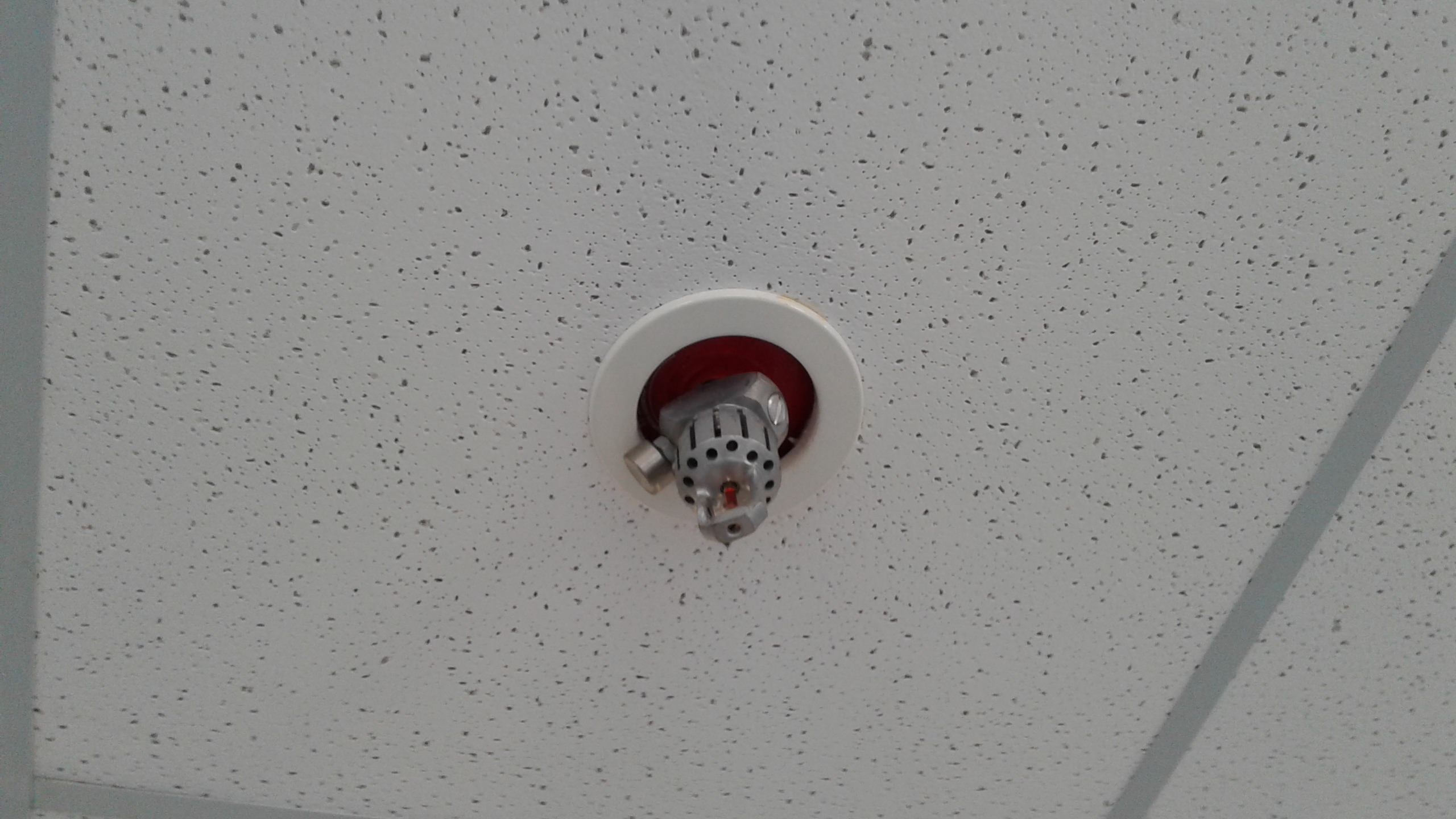 автосервісний центр